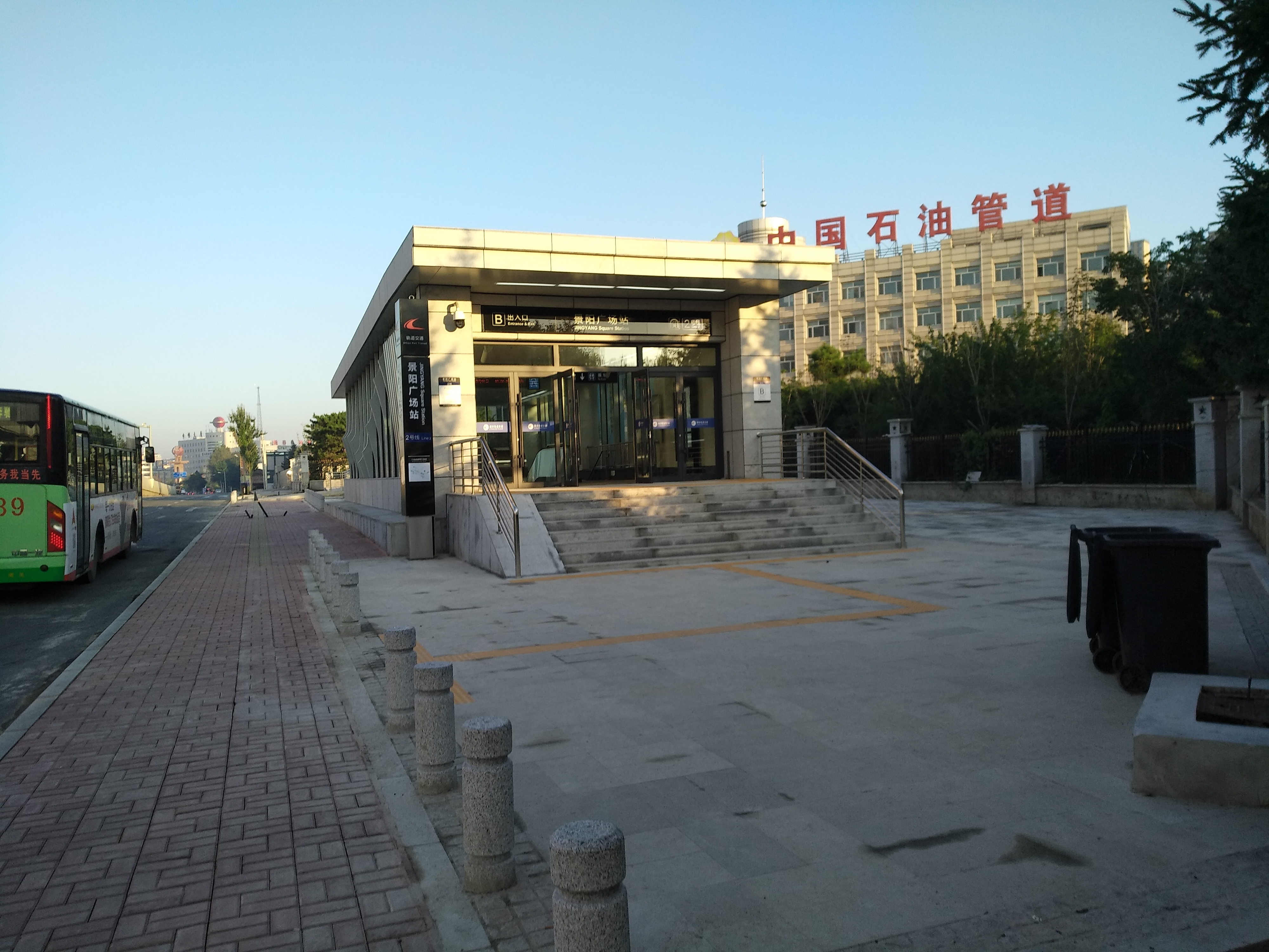 长春地铁二号线景阳广场站出入口